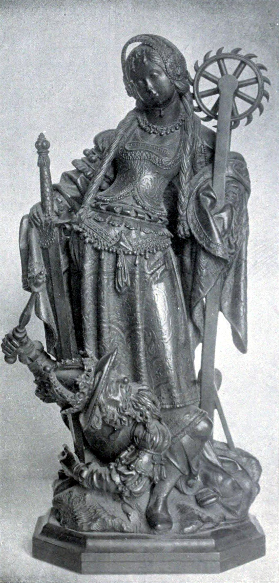 Sainte Catherine, statuette en bois, Allemagne XVIe siècle